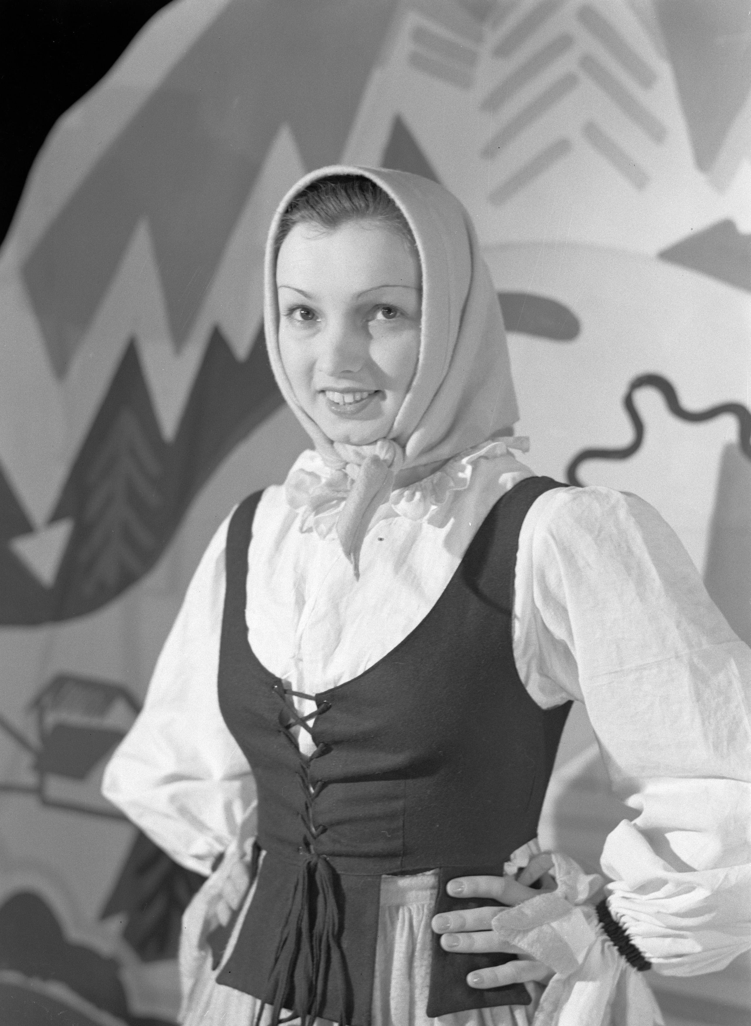 Collectie / Archief : Fotocollectie Van de Poll Reportage / Serie : Reis naar Polen Beschrijving : Kleinkunstenares Stephanie Górska als meisje van het platteland Datum : 1934 Locatie : Polen, Warschau Trefwoorden : acteurs, cabaret, kostuums Persoonsnaam : Górska, Stephanie Fotograaf : Poll, Willem van de Auteursrechthebbende : Nationaal Archief Materiaalsoort : Glasnegatief Nummer archiefinventaris : bekijk toegang 2.24.14.02 Bestanddeelnummer : 190-1247